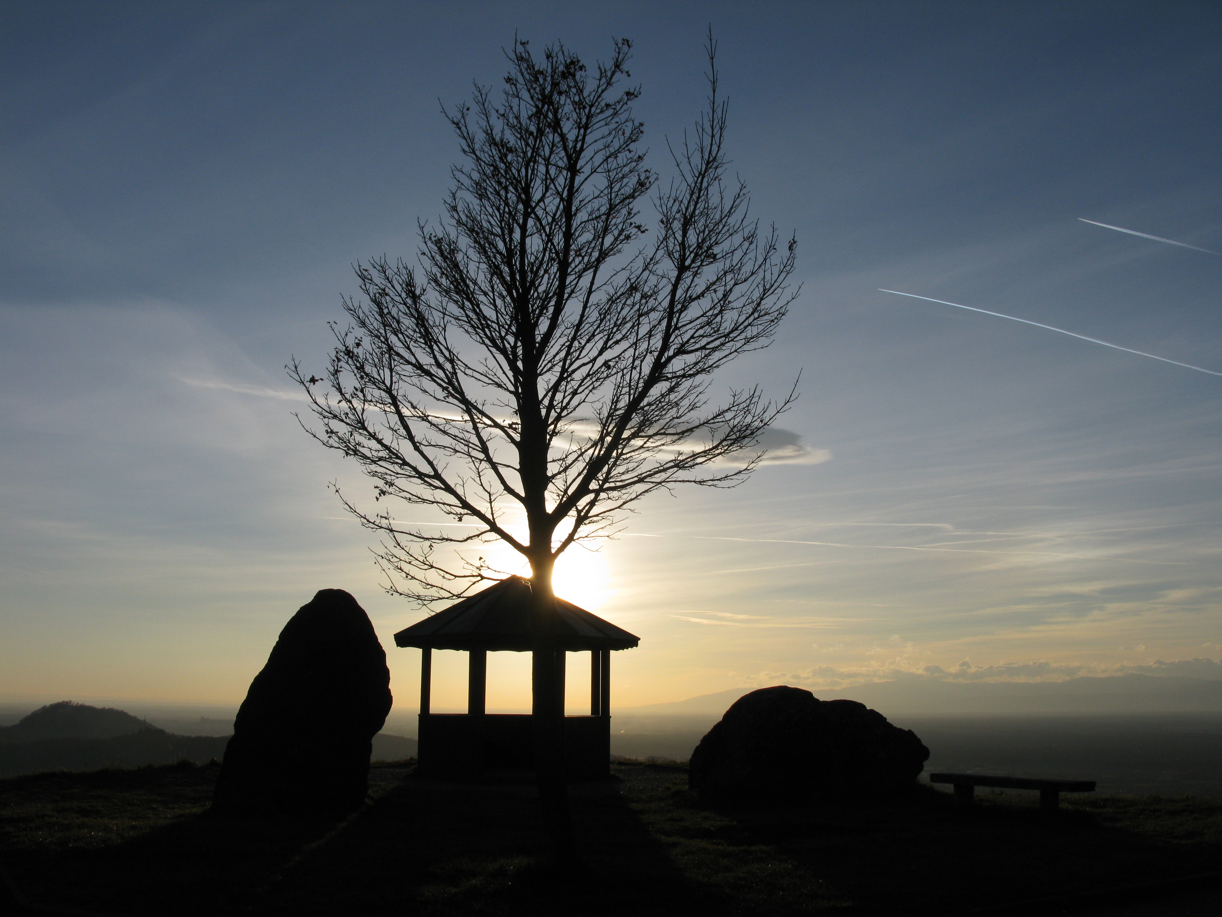 Blick vom Aussichtspunkt Mondhalde in Vogtsburg-Oberrotweil im Kaiserstuhl